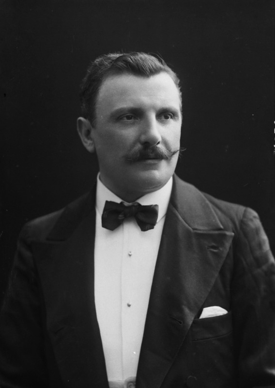 L'attore teatrale Carlo Rosaspina